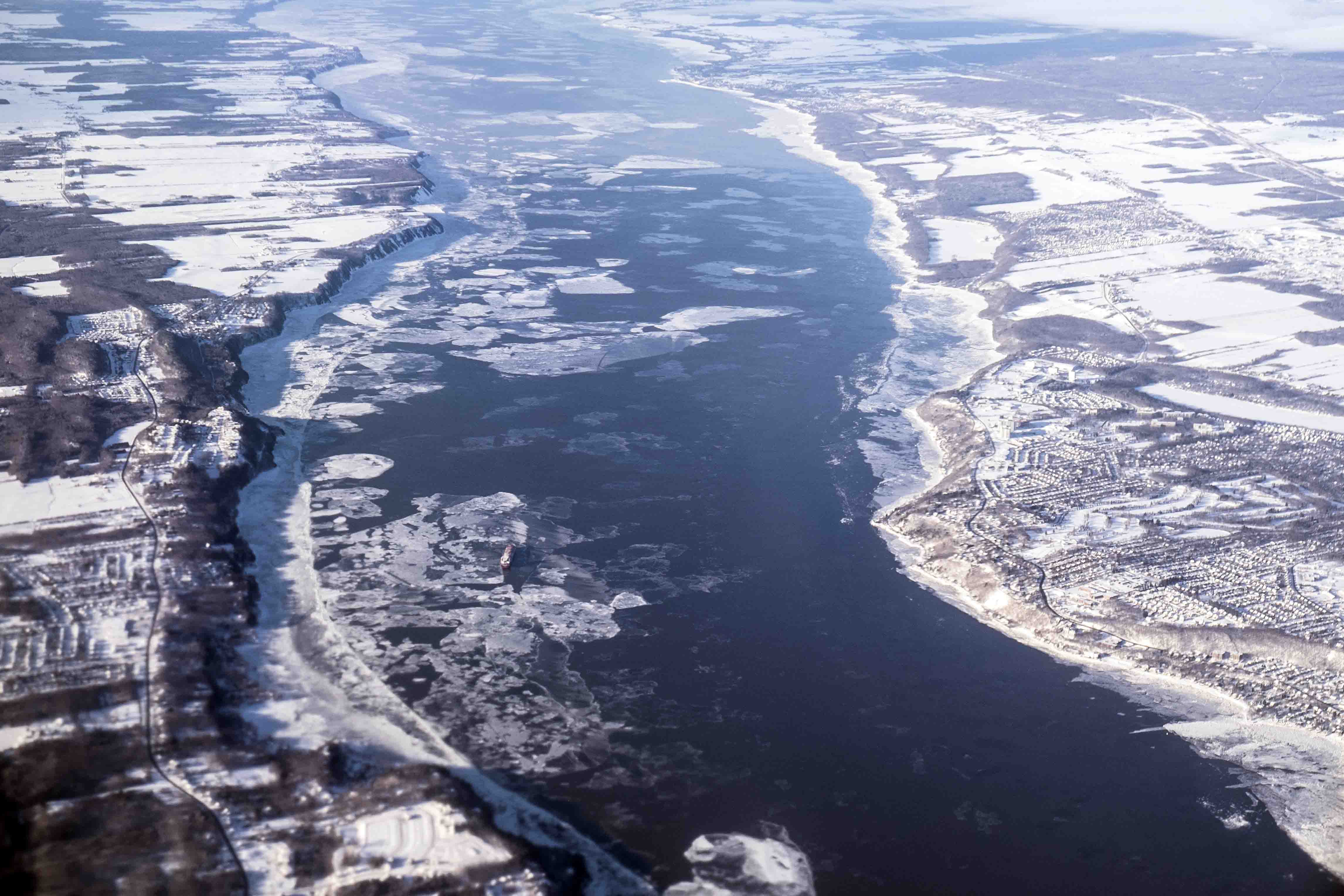 Vue aérienne du fleuve St Laurent, au niveau de l'ouest de la ville de Québec, janvier 2016. À droite sur la photo, Cap-Rouge et, plus loin, Saint-Augustin.